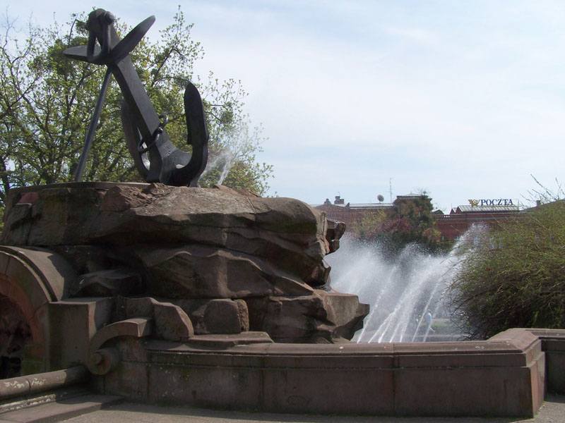 Pomnik z kotwicą w Szczecinie, dawniej Pominik Sediny